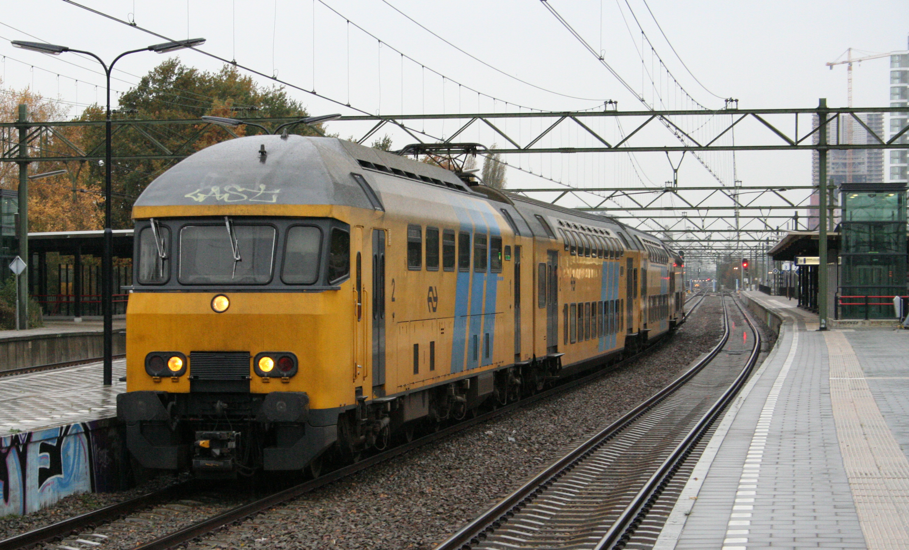 DDAR te Den Haag, laan van NOI